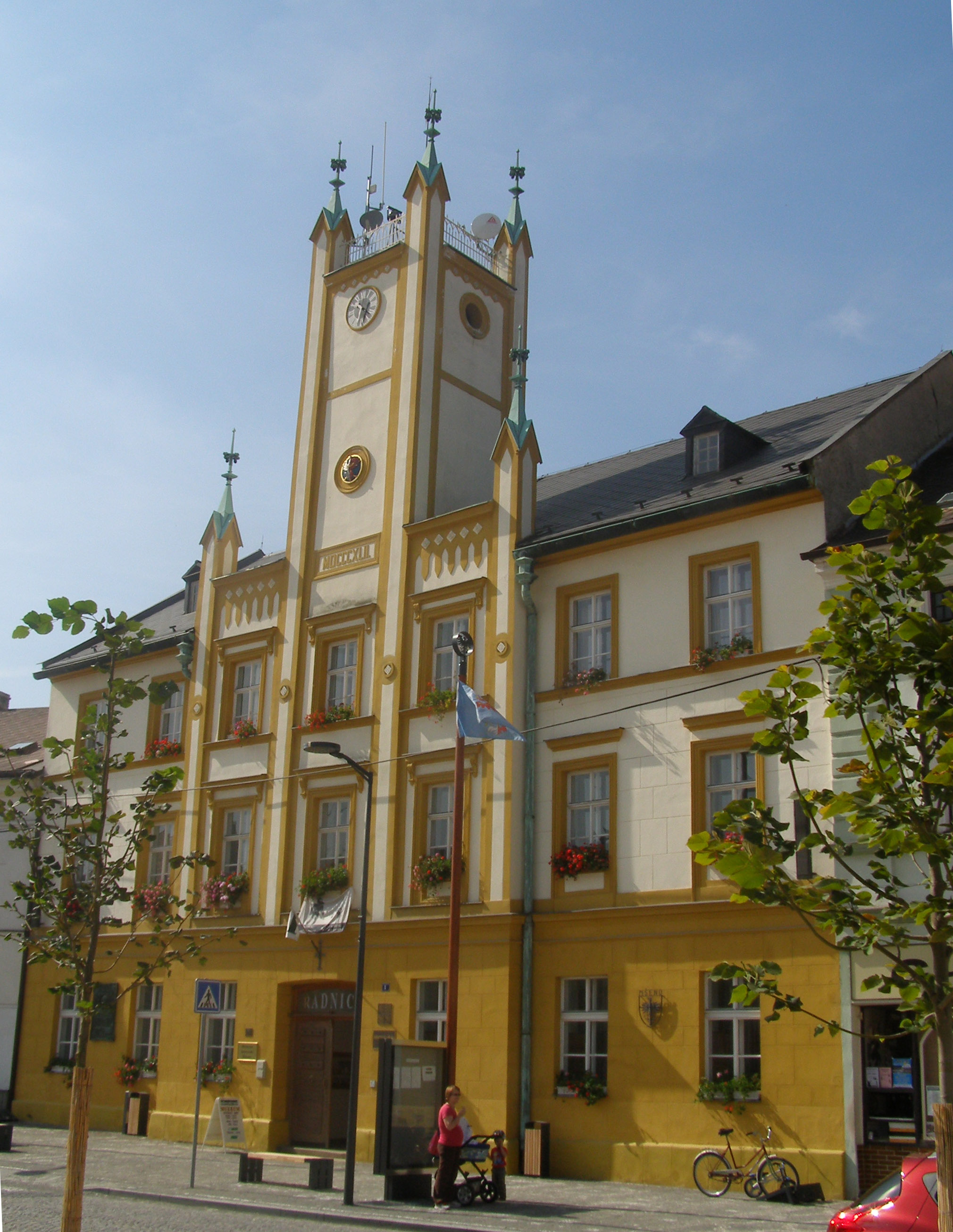 Radnice (Mšeno)